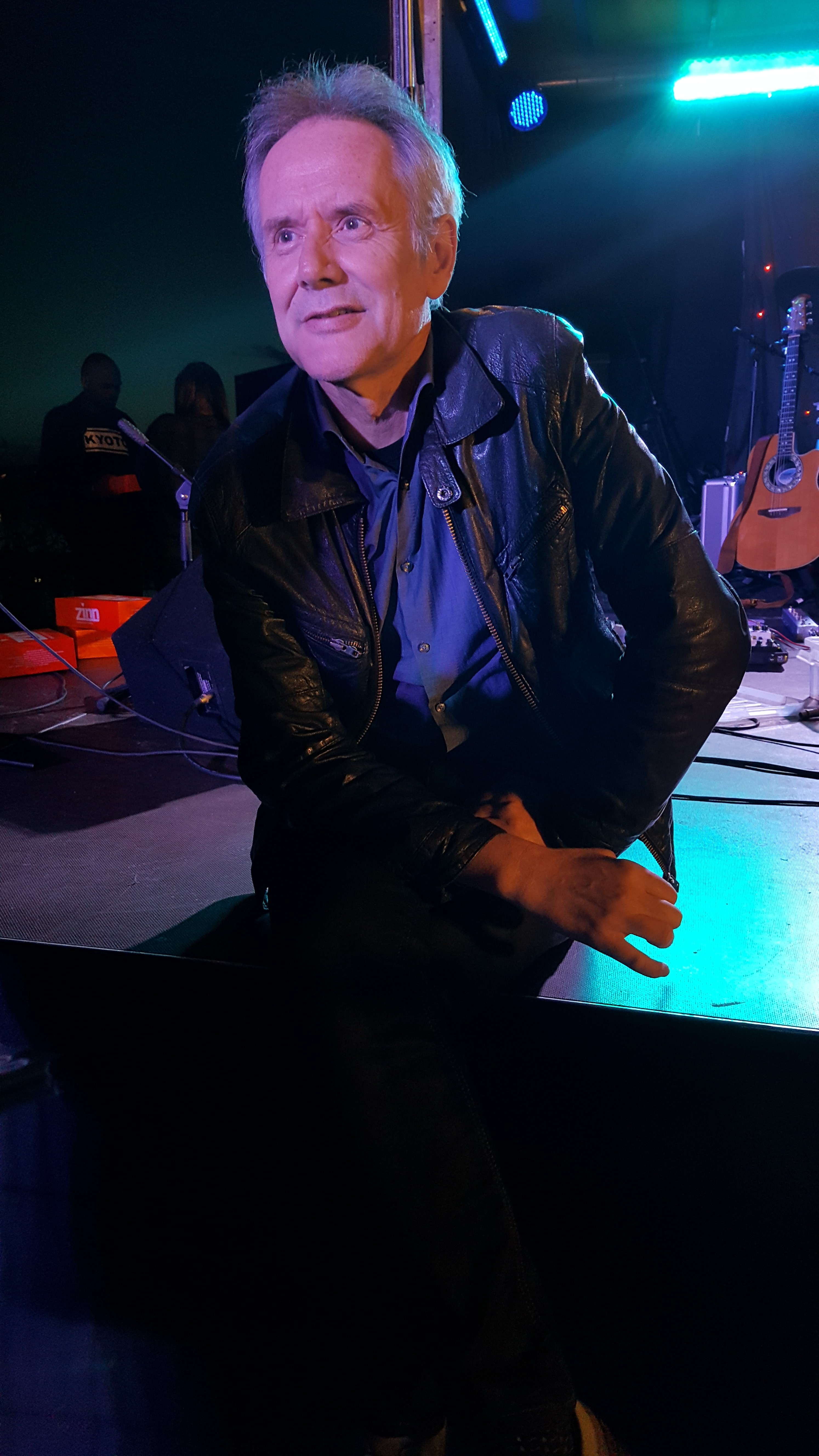 Sander van Herk, Winkelcentrum oosterheem zoetermeer v 5 jarig bestaan.